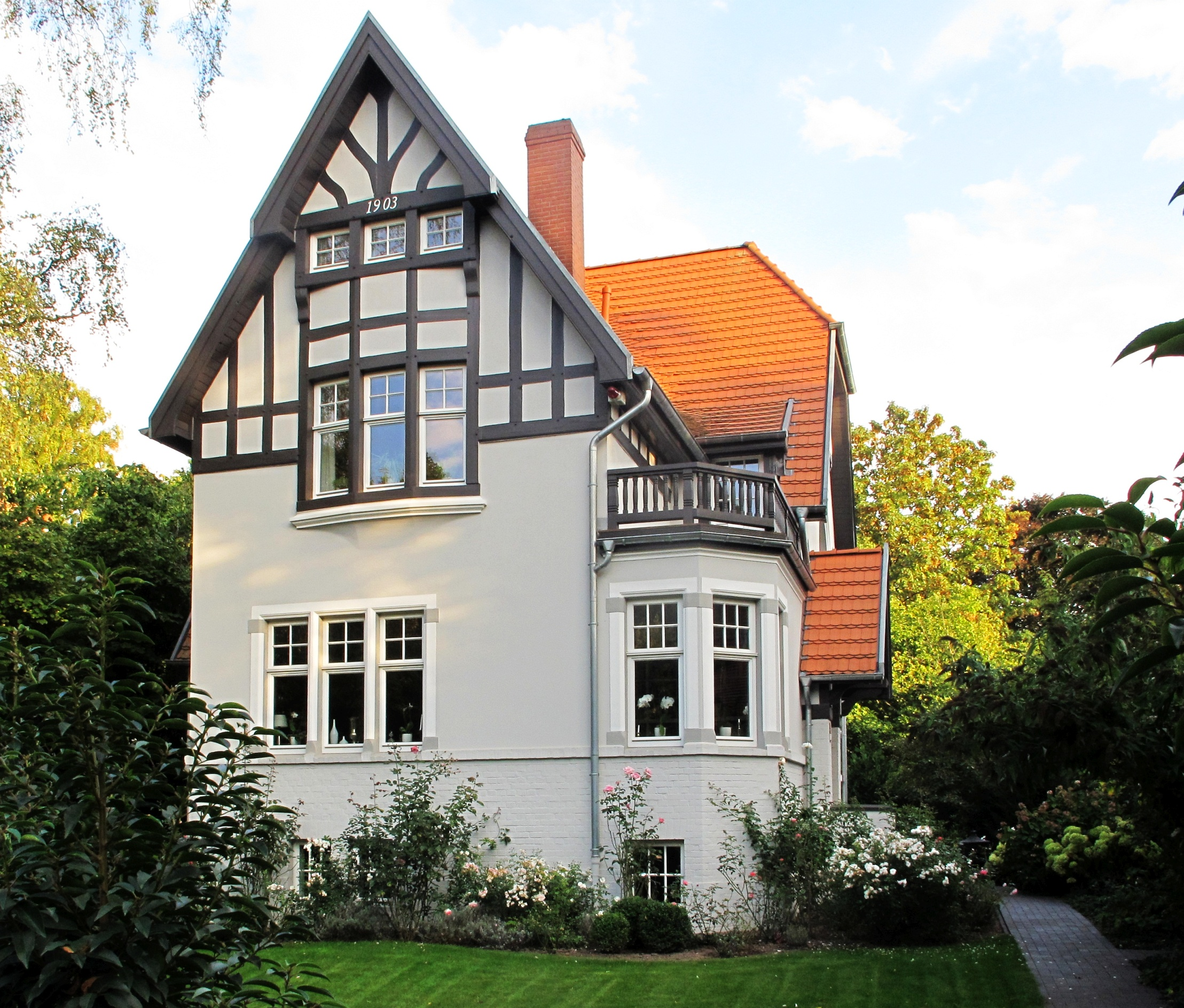 Haus Lassmann in Bremen, Schwachhauser Heerstraße 339Das abgebildete Objekt ist ein geschütztes Kulturdenkmal in der Freien Hansestadt Bremen, mit der Nr. 5046 beim Landesamt für Denkmalpflege registriert.